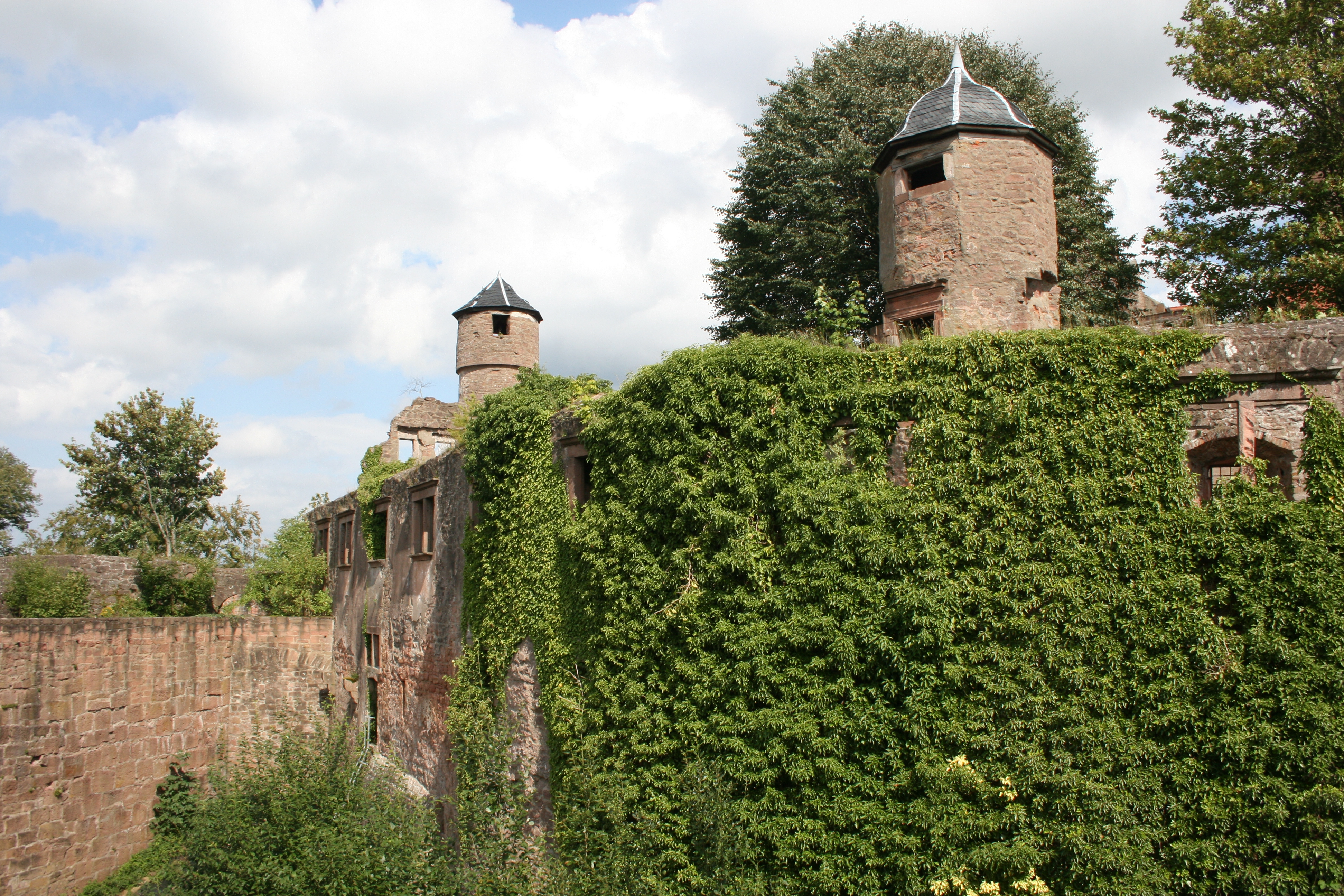 Renaissancezeitlicher Foeppelsbau in der Vorburg der Burg Breuberg und "Fuchsgraben" (=Graben zwischen Vorburg und Schütt).